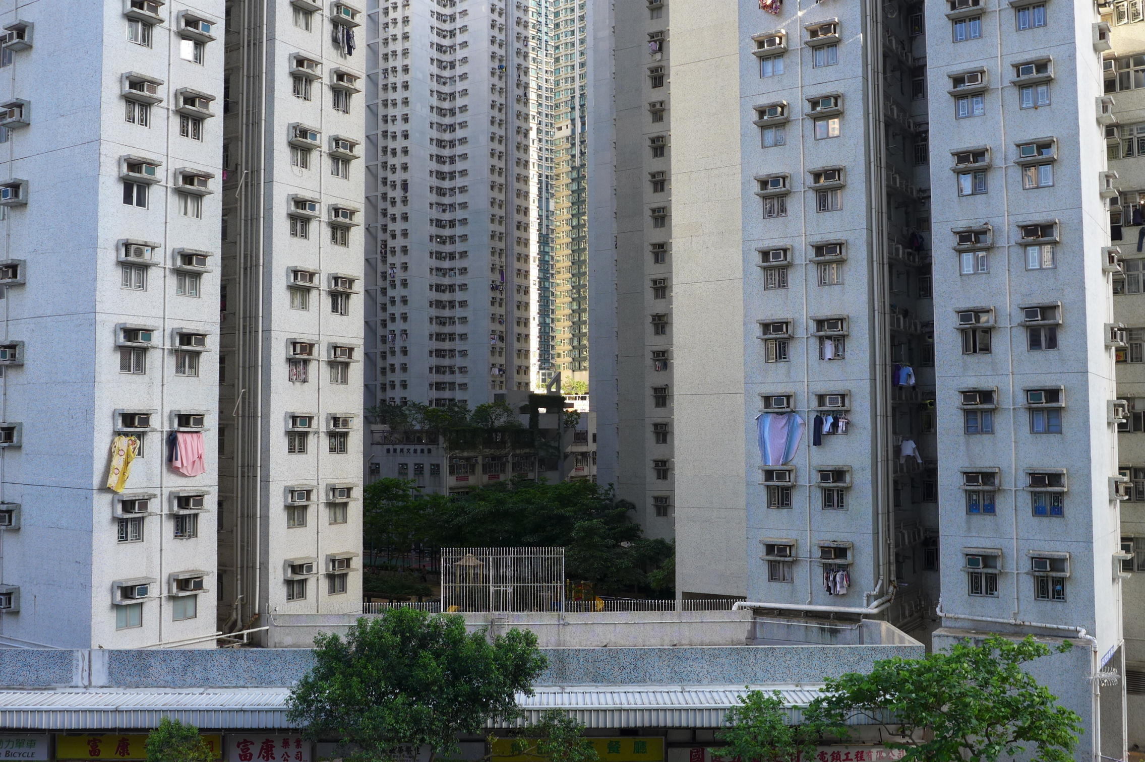 Beverly Garden, Tseung Kwan O